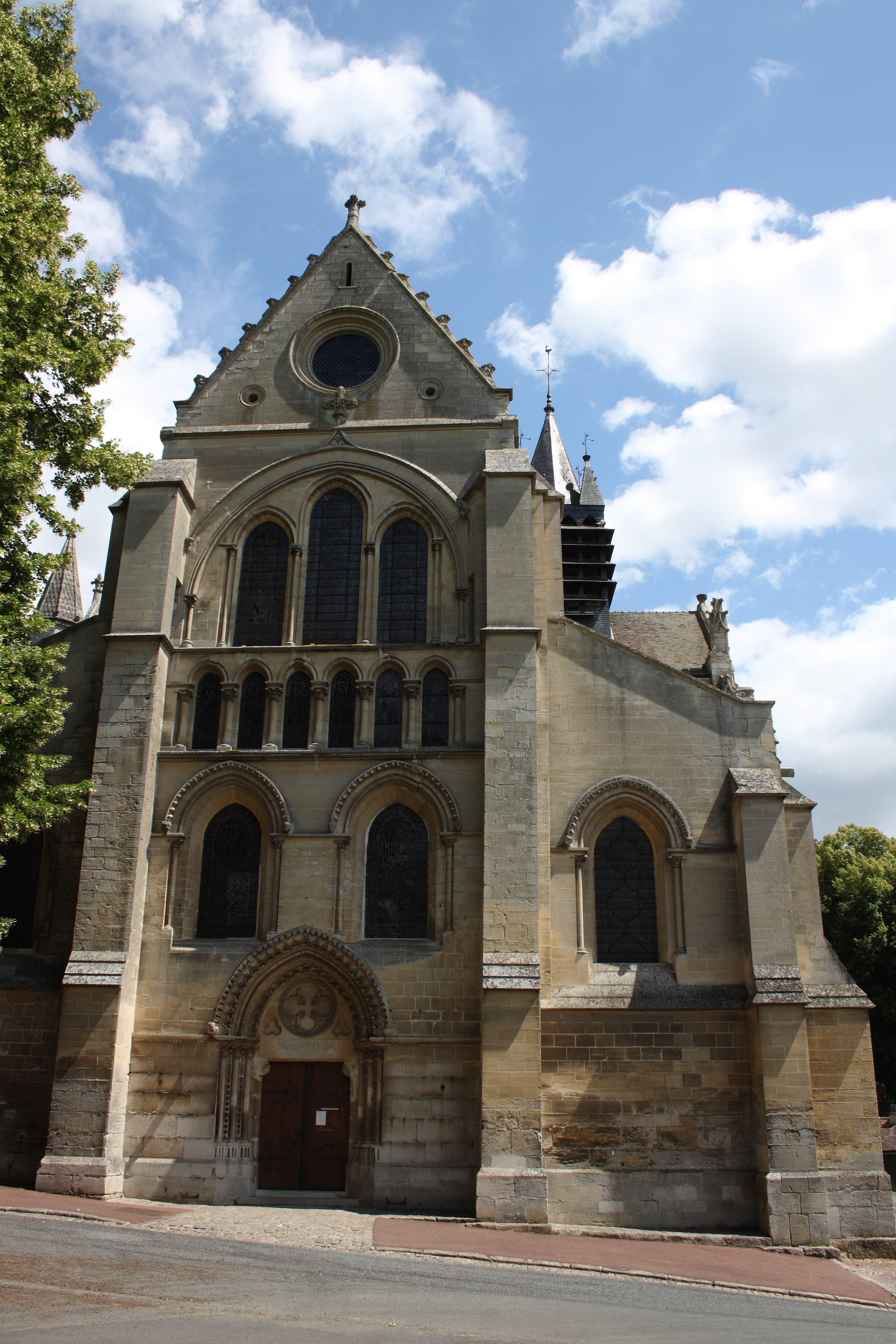 Katholische Kirche Notre-Dame in Taverny, einer Gemeinde im Département Val-d'Oise (Île-de-France), Ansicht von Westen